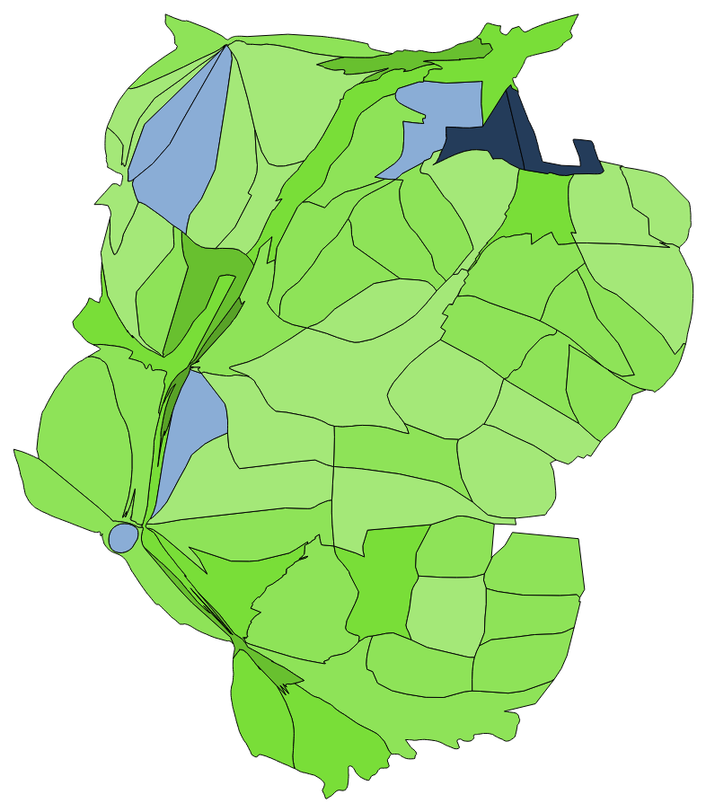 顏色對照表